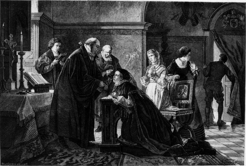 Elisabeth, Kurfürstin von Brandenburg, nimmt heimlich das heilige Abendmahl in beiderlei Gestalt. Holzstich nach einem Gemälde von Adolph Treidler (1846–1905), erschienen in: Zeitschrift für bildende Kunst 9 (1874).